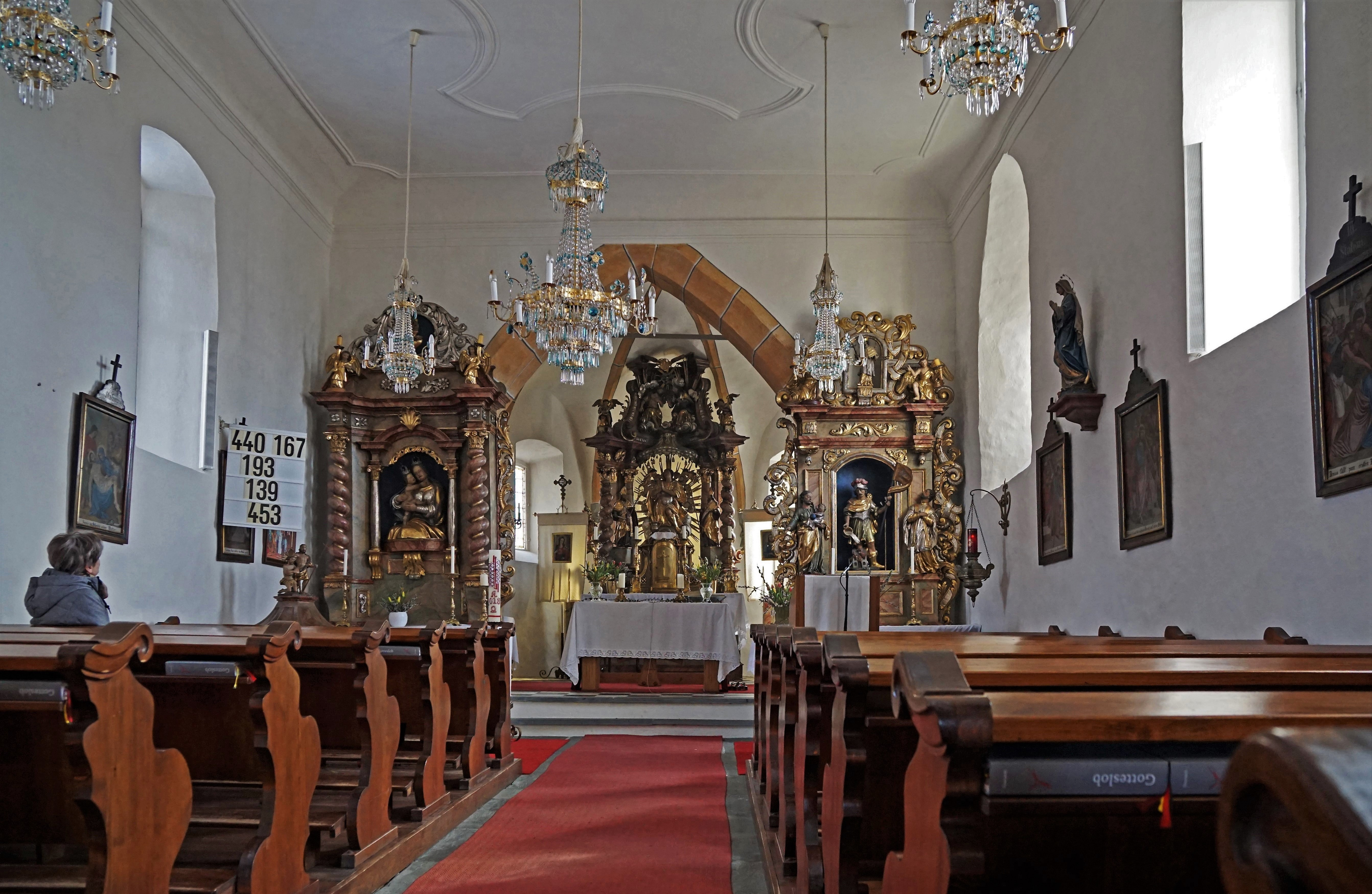 Kath. Pfarrkirche Klein St. Veit, Feldkirchen in Kärnten, Innenansicht